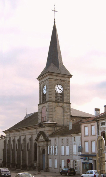 Eglise Sainte-Madeleine